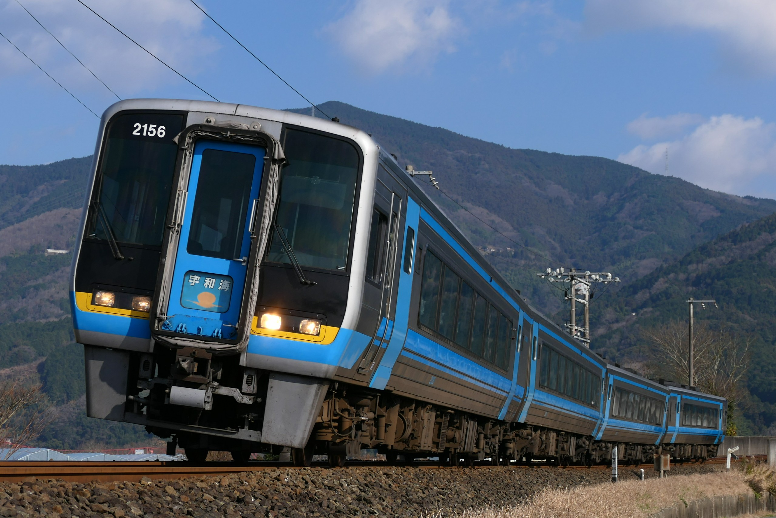 JR四国2000系・宇和海号